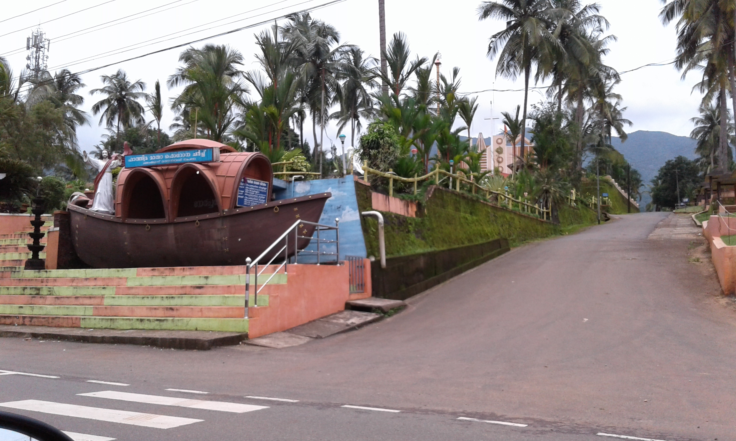 ബഥേൽ ഗാർഡൻ, ചുങ്കക്കുന്ന് ഫാത്തിമ മാതാ പള്ളി.